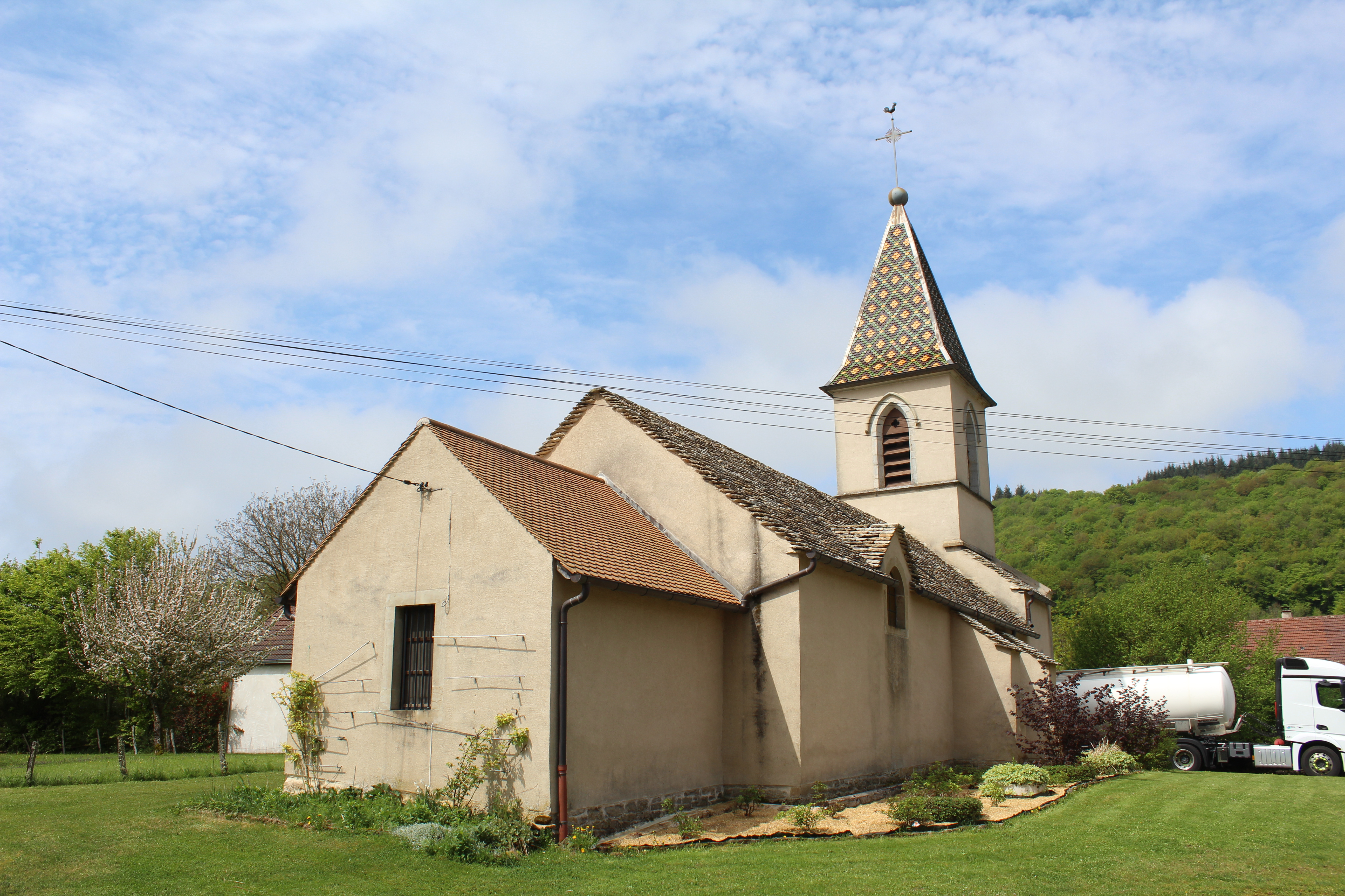 Église Saint-Rémy de Reithouse.